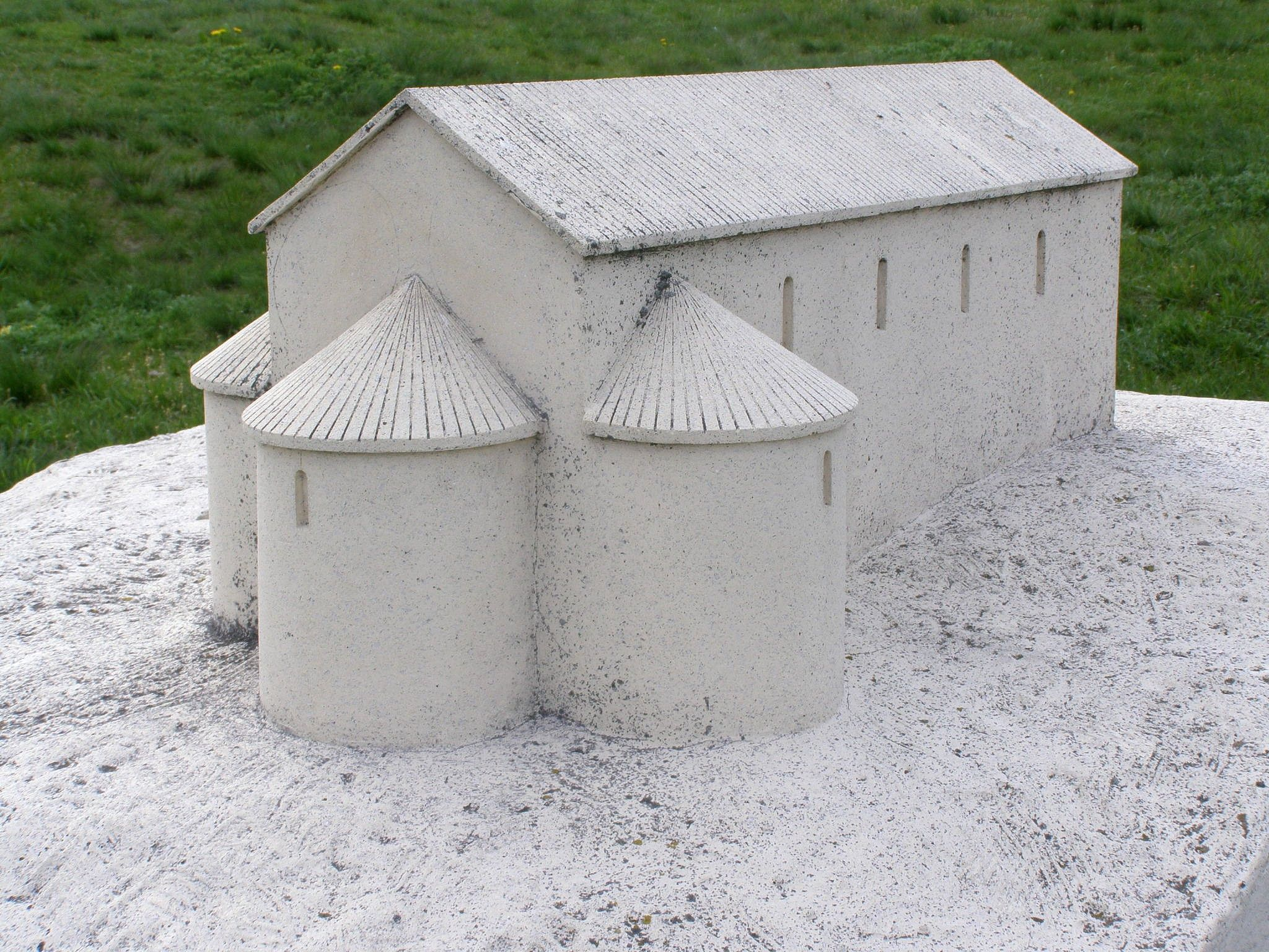 Predpokladaný vzhľad veľkomoravského kostola z druhej polovice 9. storočia. K pozdĺžnej lodi sa pripájali tri polkruhové apsidy